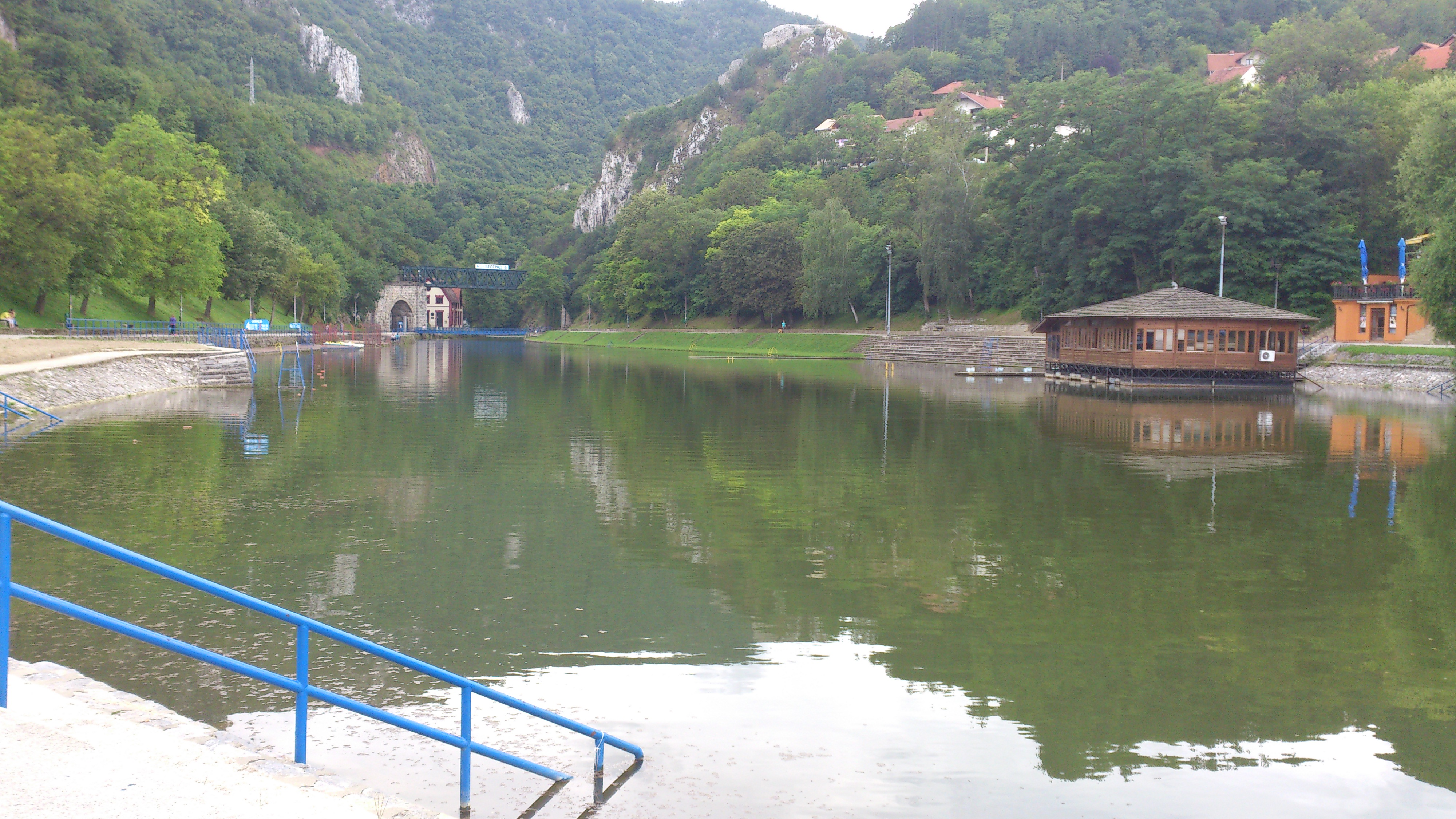 Šetnja gradom na Đetinji u julu 2014. godine.